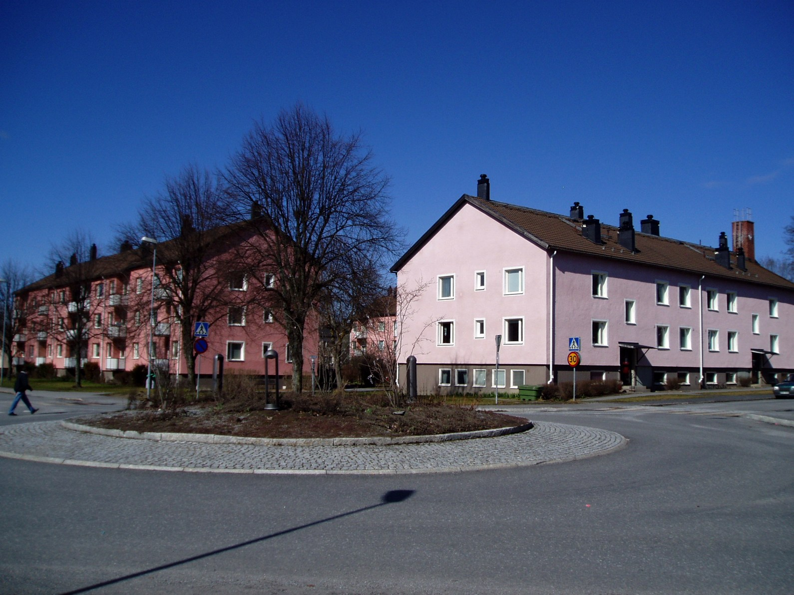 centrala Rosersberg, Sigtuna kommun, Uppland, Sverige